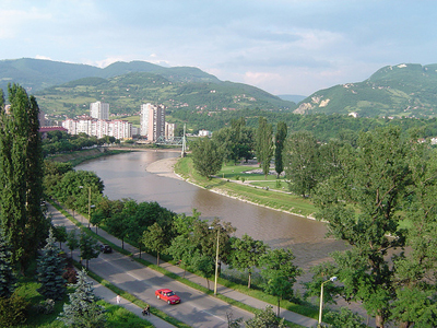 Zenica